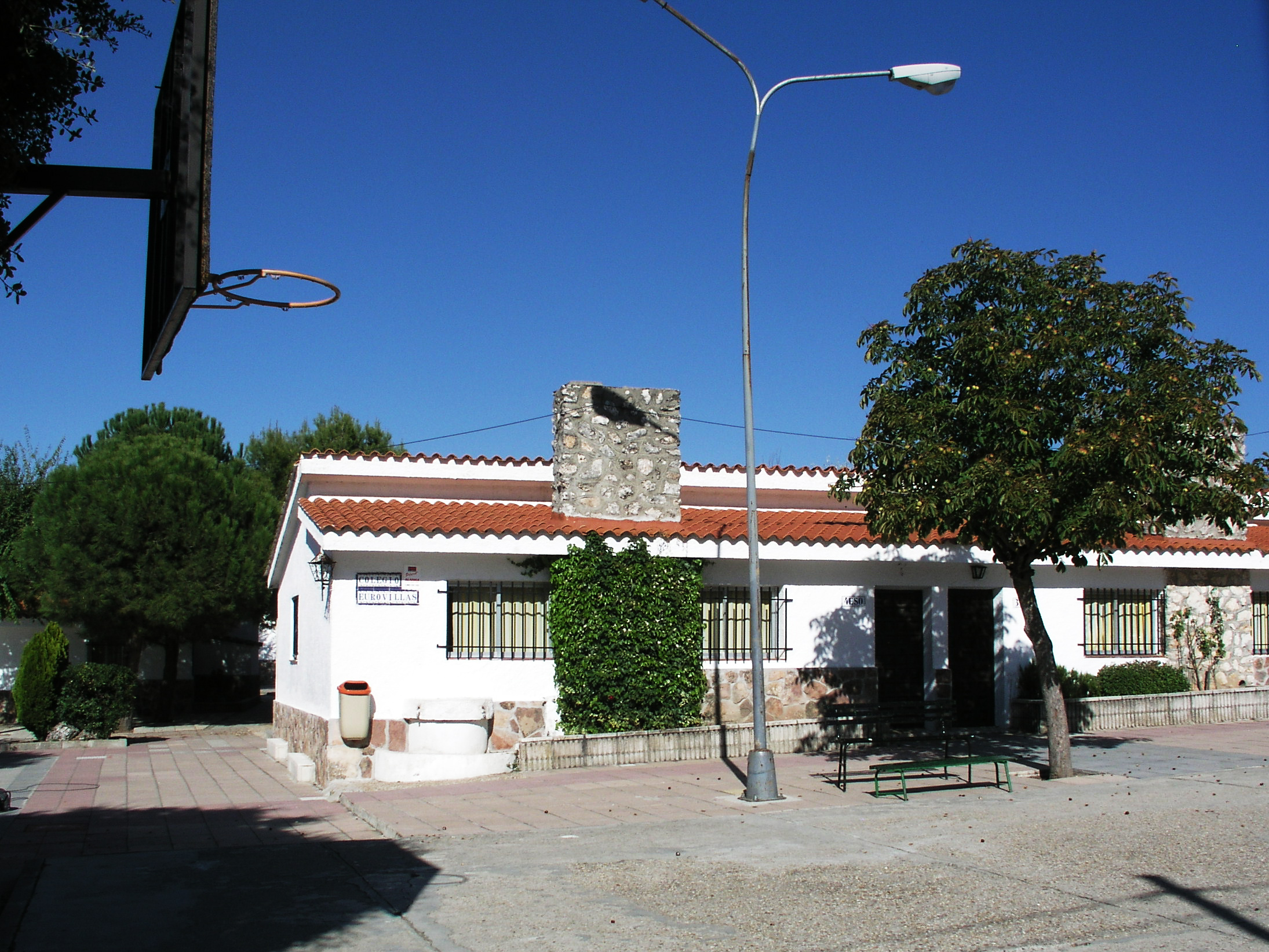 Colegio Eurovillas, Nuevo Baztán, Spain.